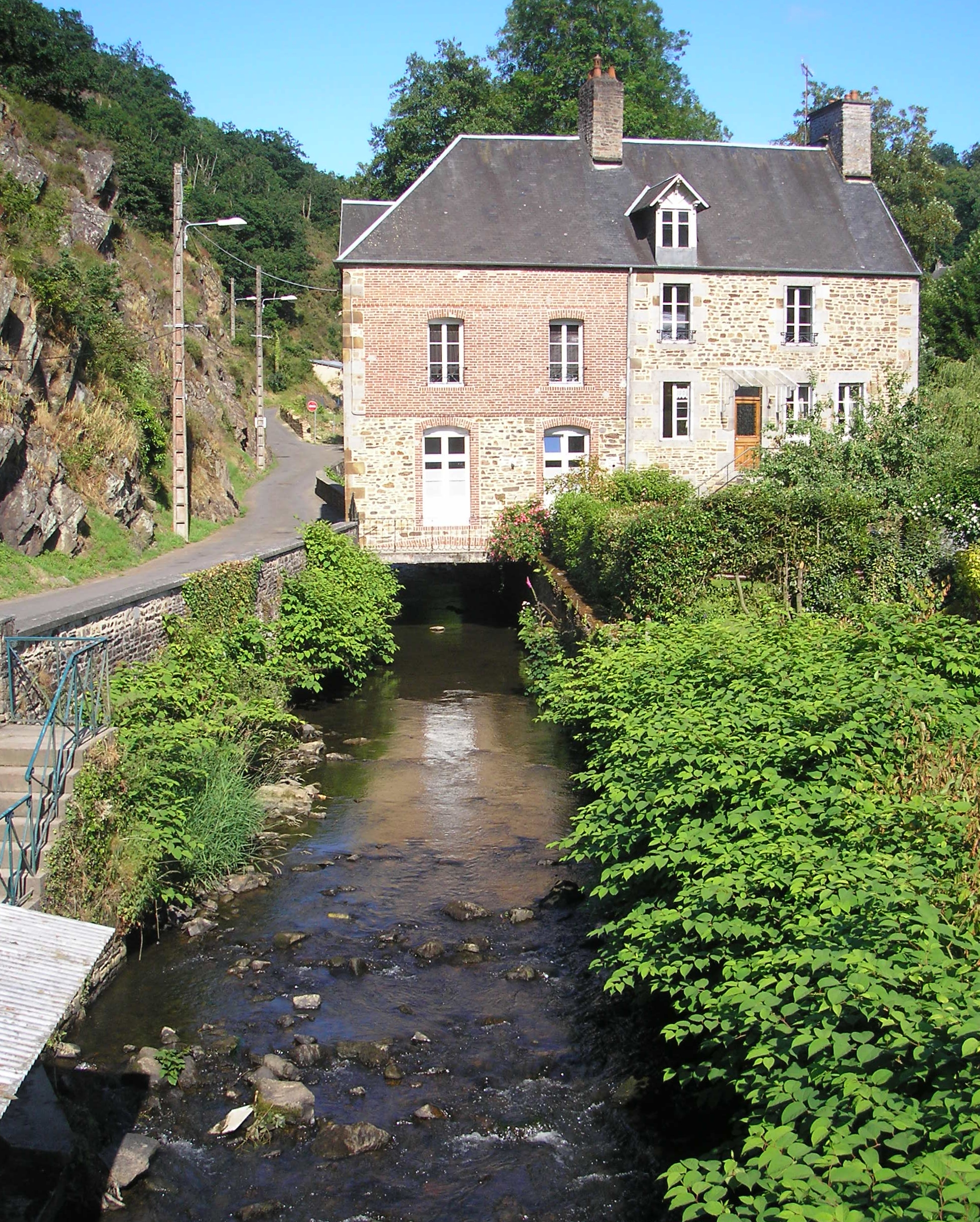 Vire (Normandie, France). Le moulin d'Olivier Basselin.